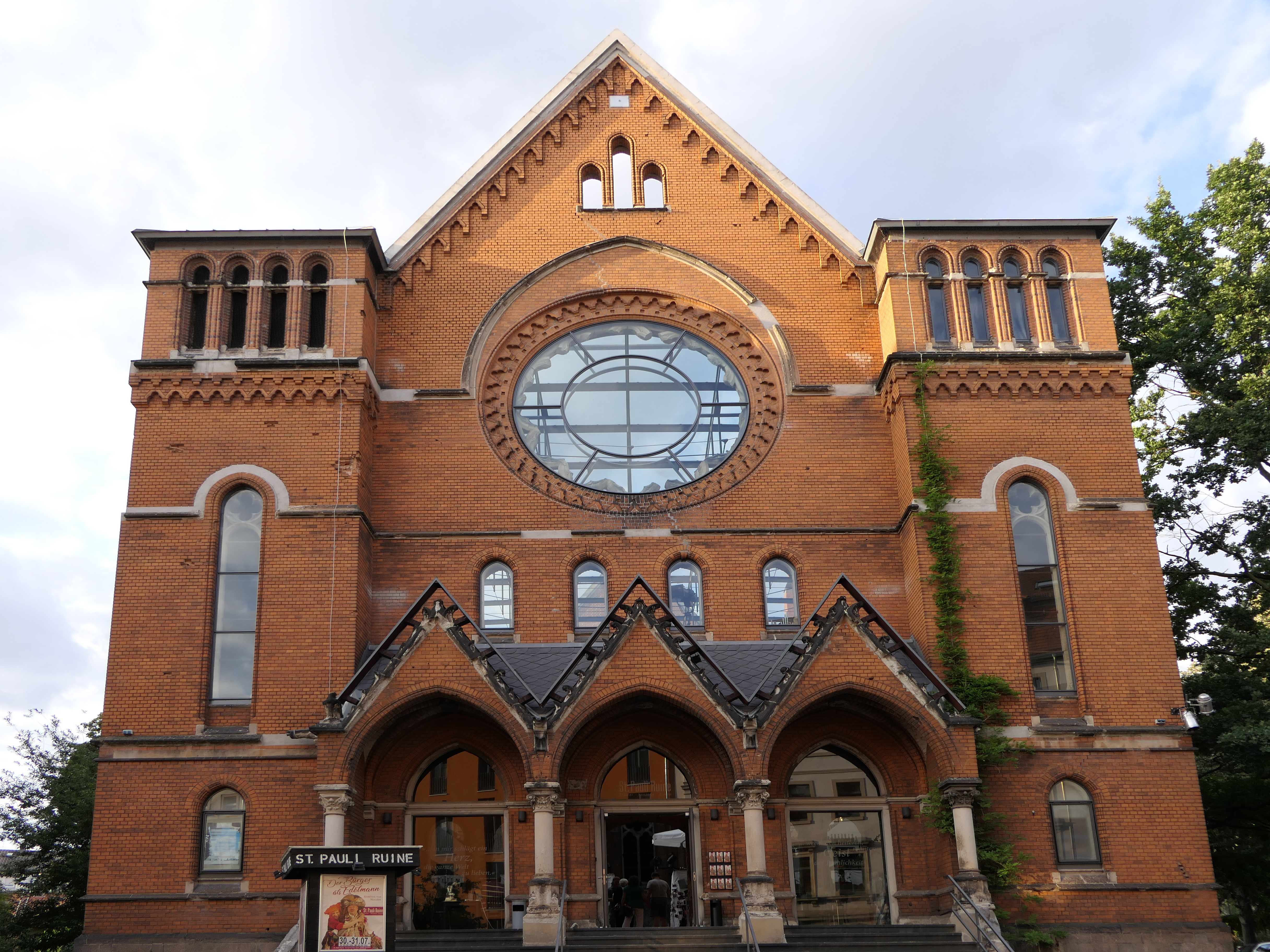 Theaterruine St. Pauli in Dresden (Hechtviertel)